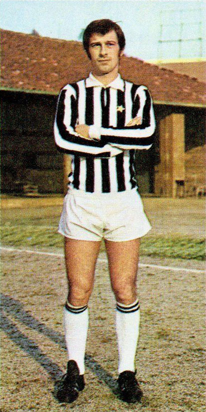 Il calciatore italiano Adriano Novellini alla Juventus all'inizio della stagione 1970-71.